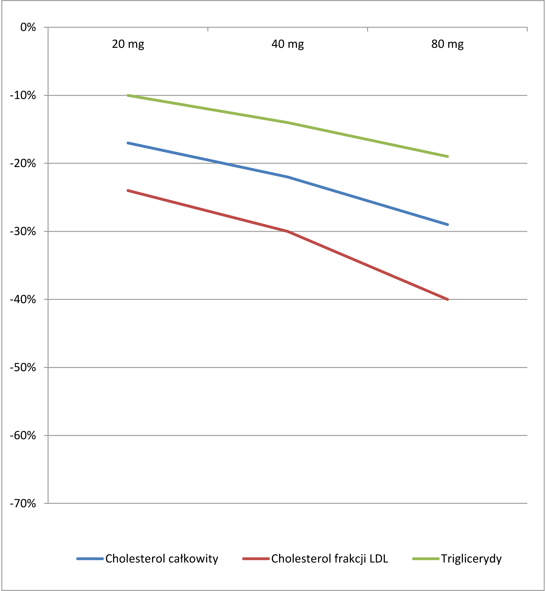 Wpływ lowastatyny na wskaźniki lipidowe (dane do wykresu za [ TABLETS ® MEVACOR (LOVASTATIN)])